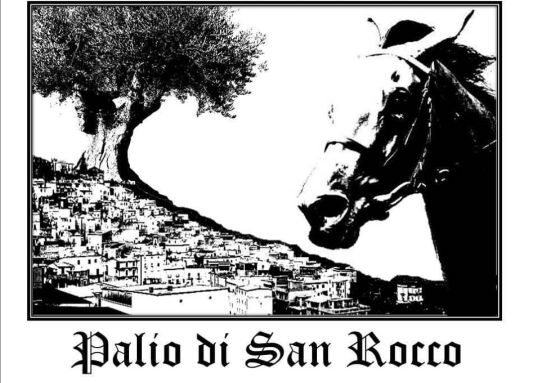 Logo Associazione Palio San Rocco